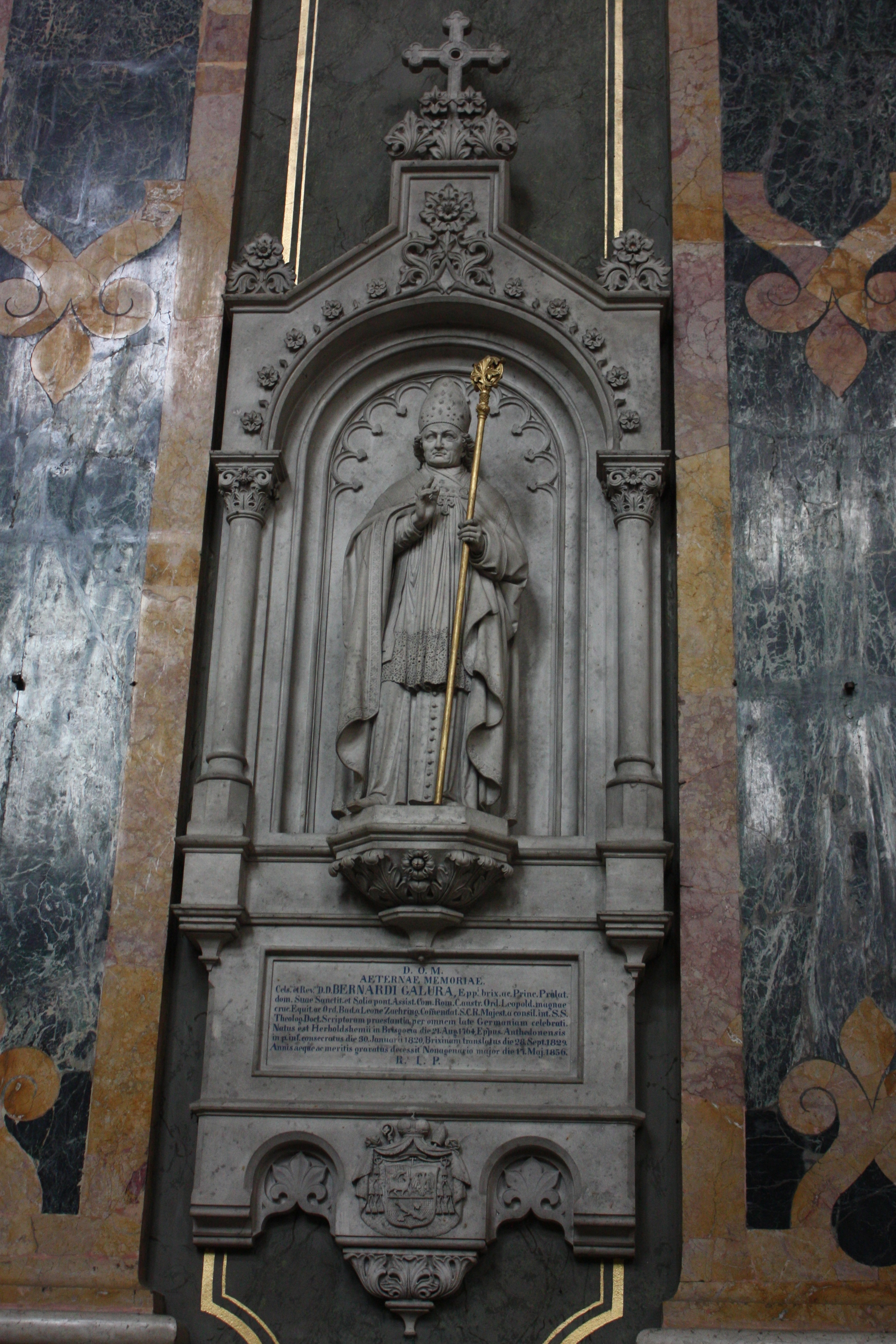 Brixner Dom (Brixen, Südtirol): Hochgrab von Bernhard Galura